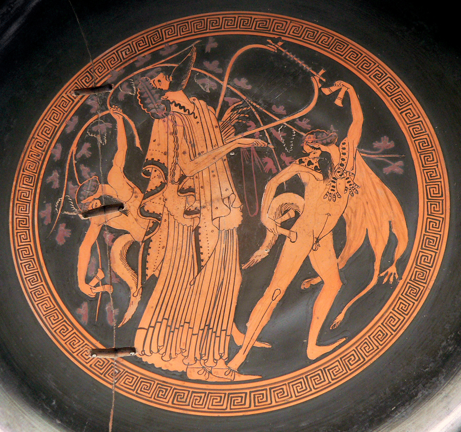 Dionysos and sileni. Attic red-figured cup interior, ca. 480 BC.